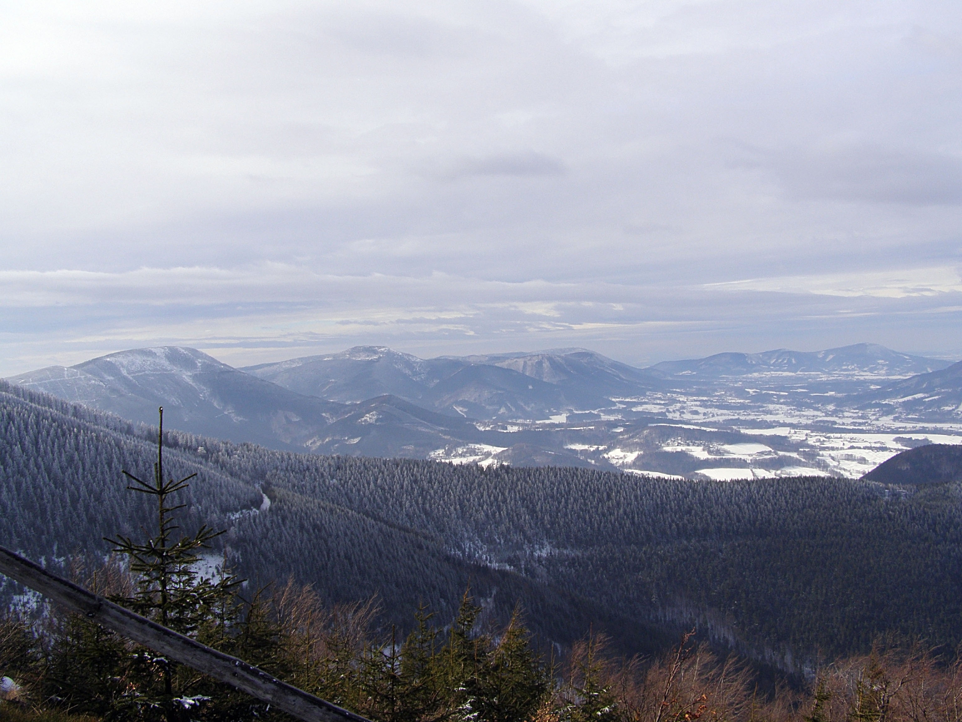 Moravskoslezské Beskydy, pohled z úbočí Malchoru na jihozápad: v popředí úbočí lysé hory, vlevo Radhošťský hřbet (Smrk, Kněhyně, Radhošť), vpravo uprostřed Radhošťské podhůří, vpravo vzadu Veřovické vrchy